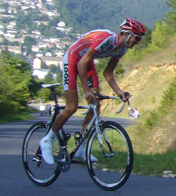 Le coureur cycliste français Brice Feuillu (CC Nogent-sur-Oise) lors du Tour du Gévaudan 2008. Photo prise à Mende en septembre 2008.